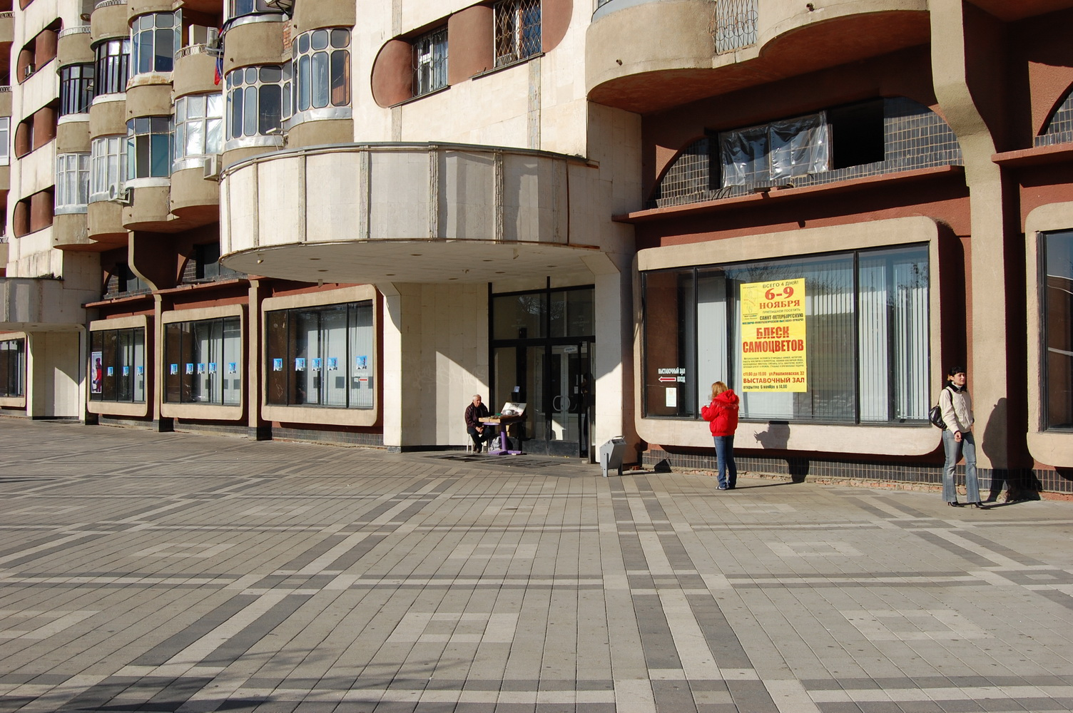 Краснодарский краевой выставочный зал изобразительного искусства